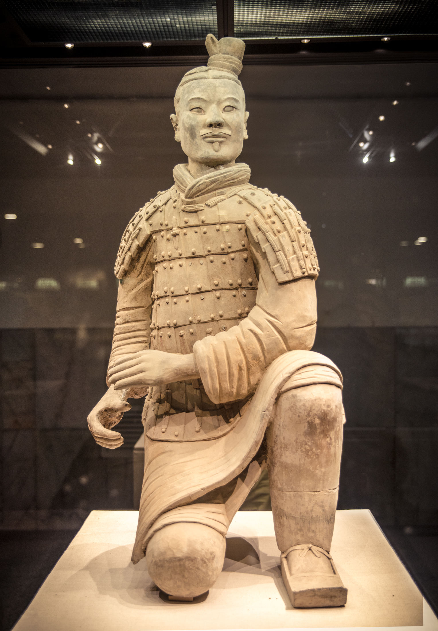 POL_3596-Editar